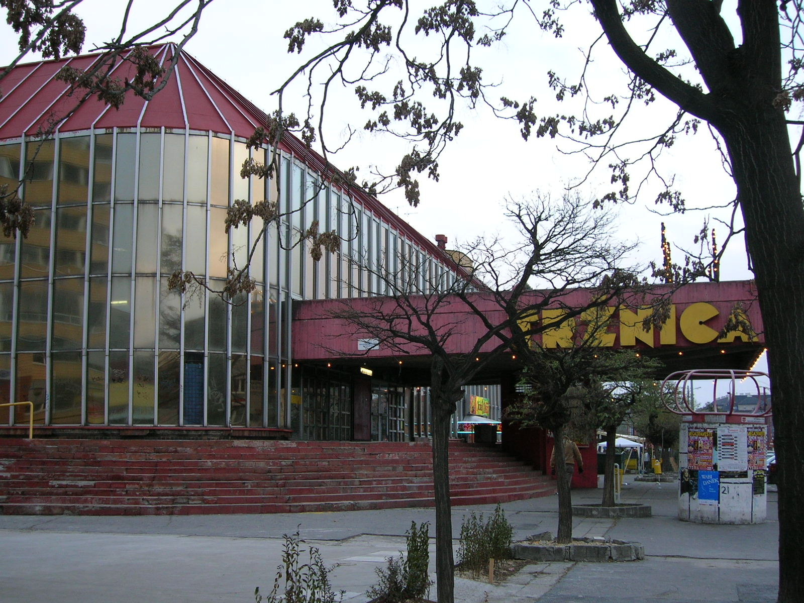 Nová tržnice v Bratislavě